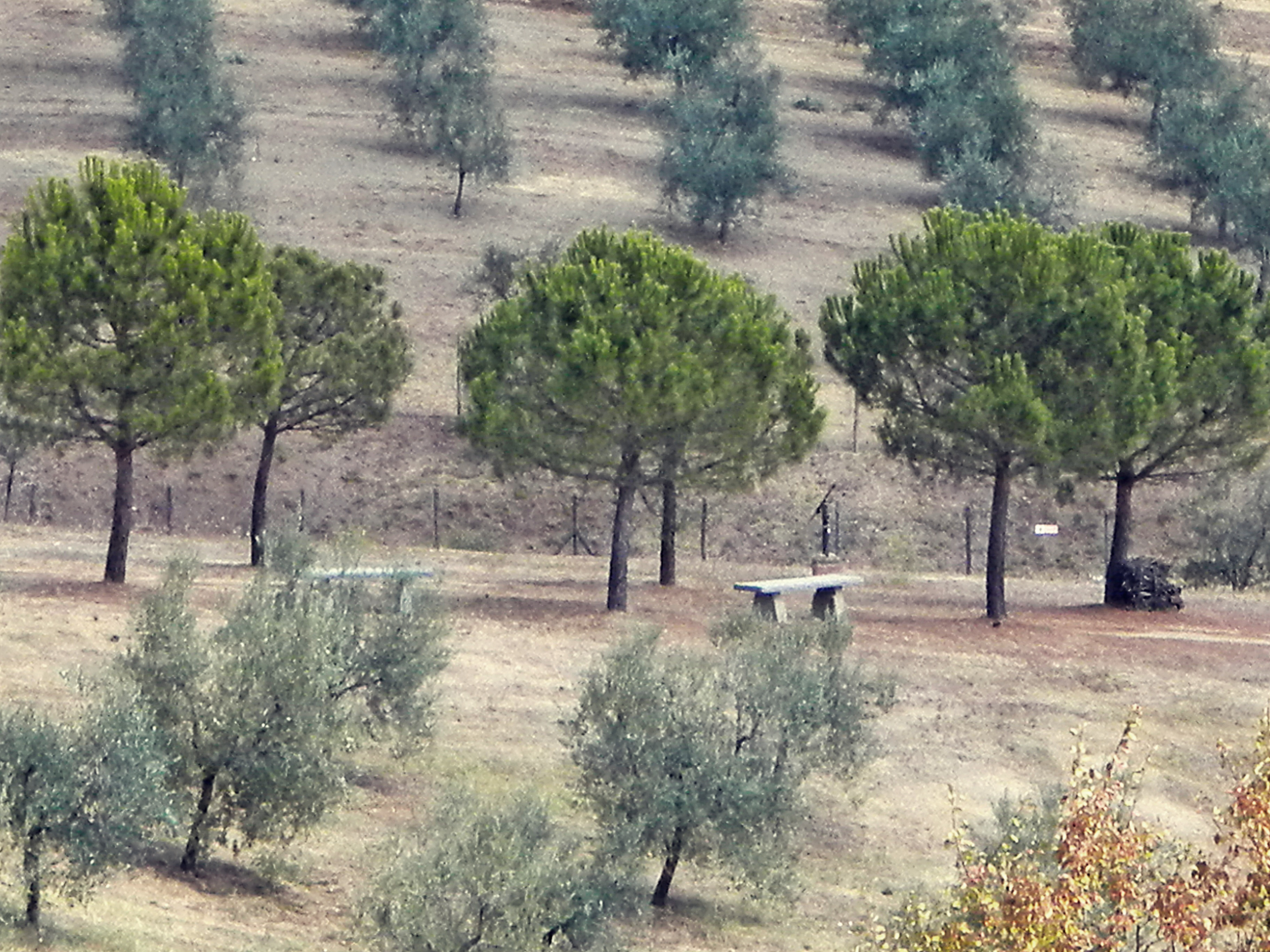 villa